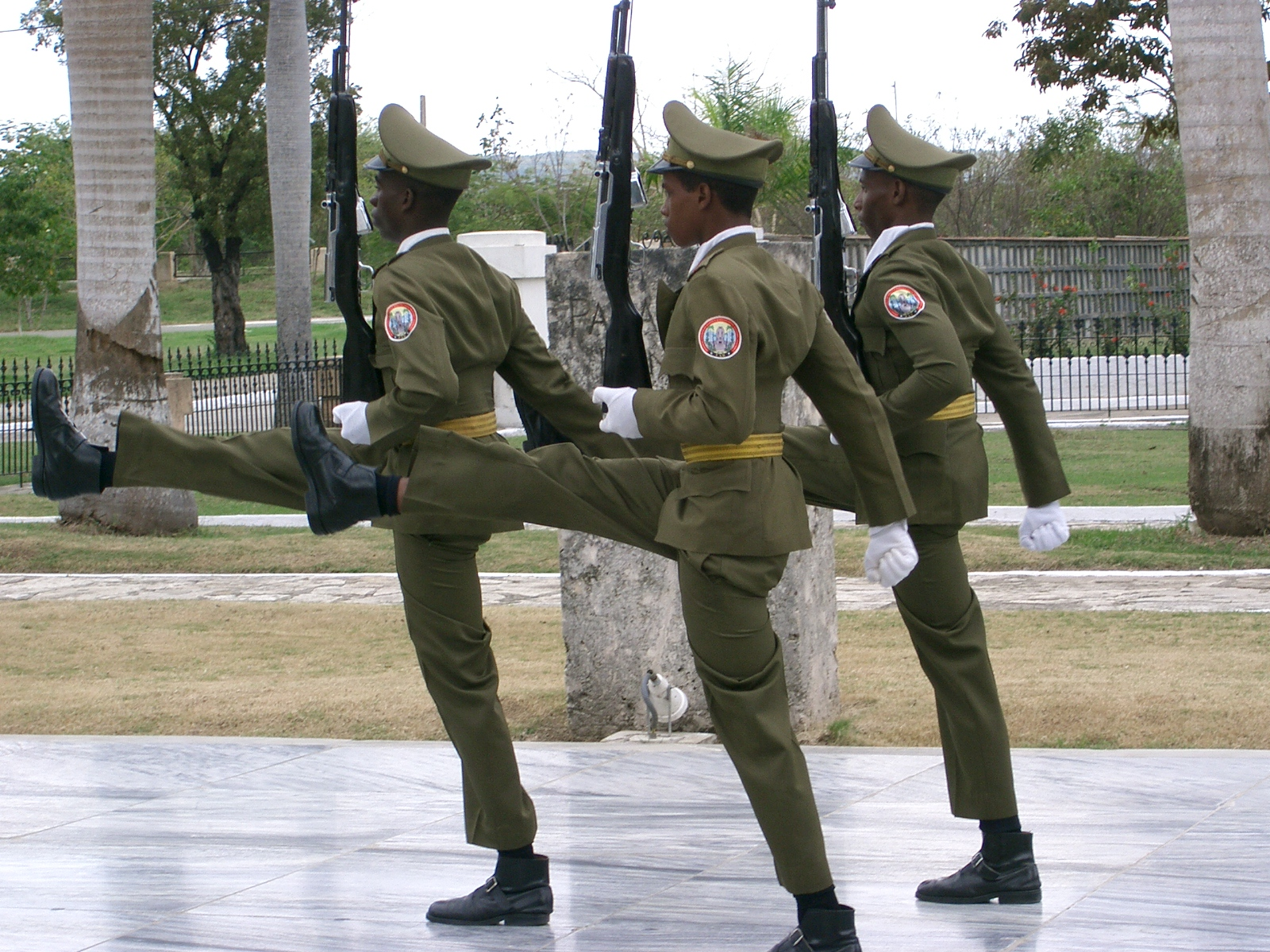 Santiago de Cuba - Cimetière Santa Ifigenia, relève de la garde au mausolée José Marti.